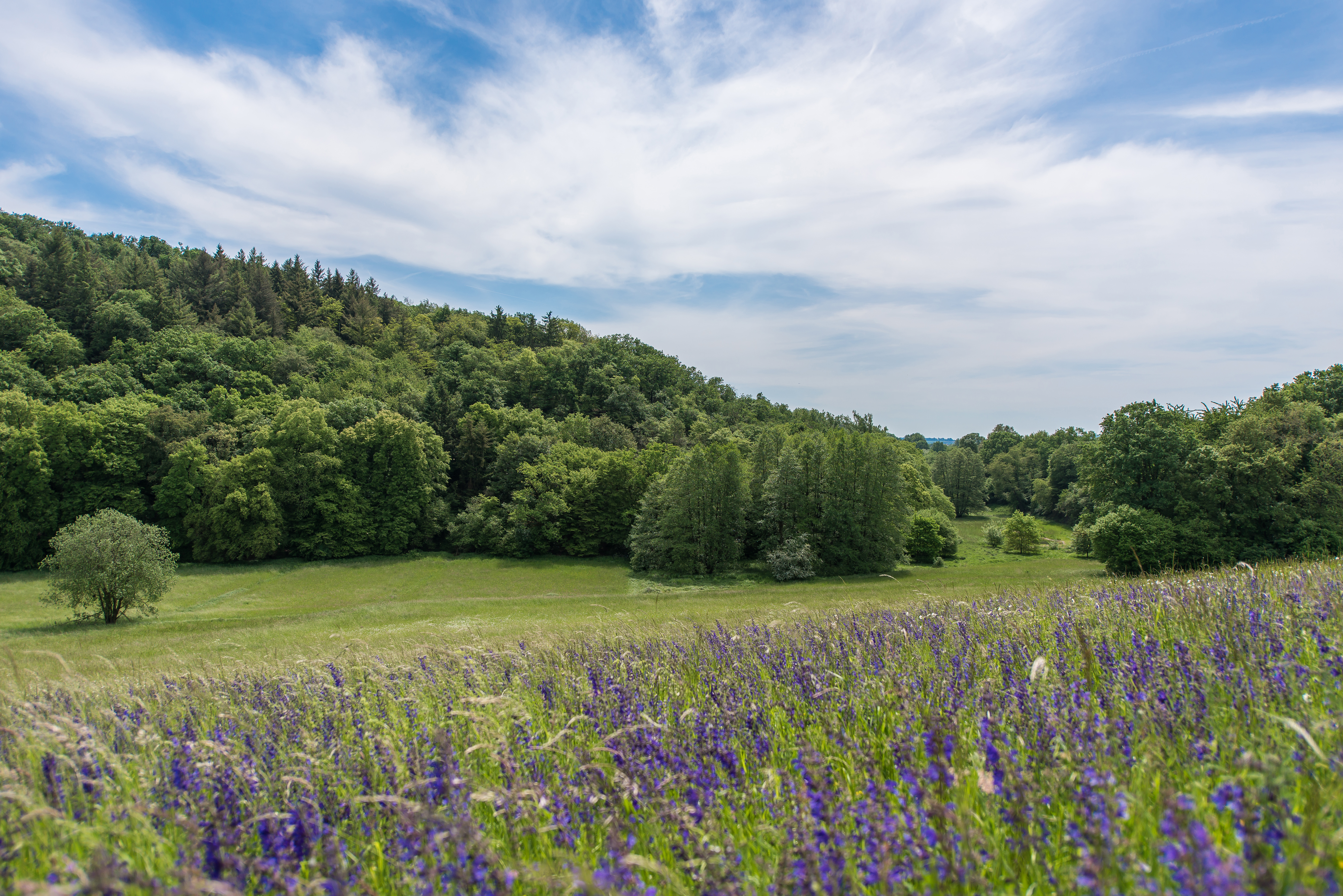 Blühende Magerwiese mit Blick auf den Wald im NSG Krebsbachtal bei Kaichen